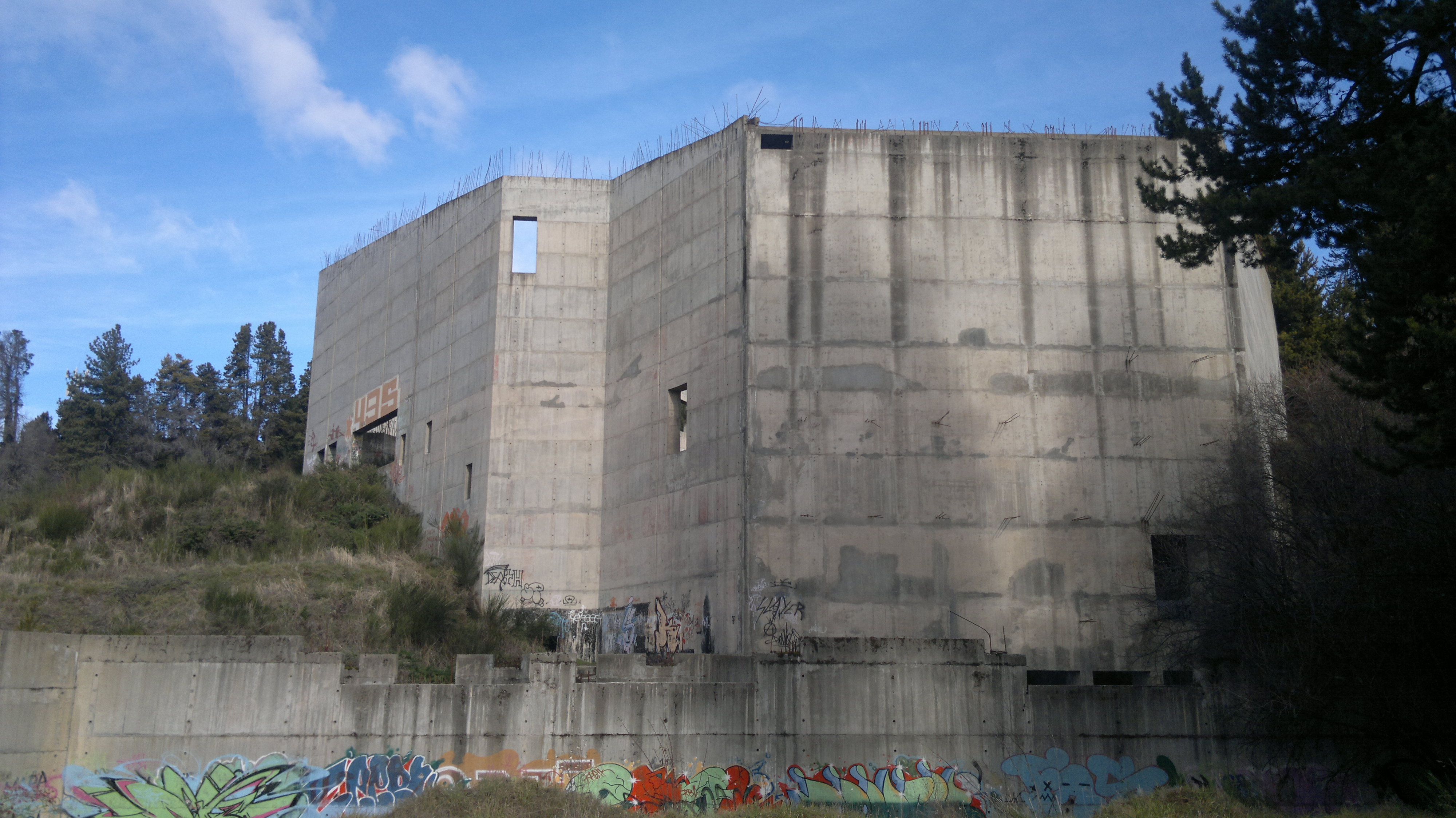 Vista exterior del lado norte en 2014.